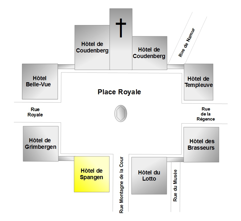 Belgique - Bruxelles - Plan de la place Royale - Hôtel de Spangen